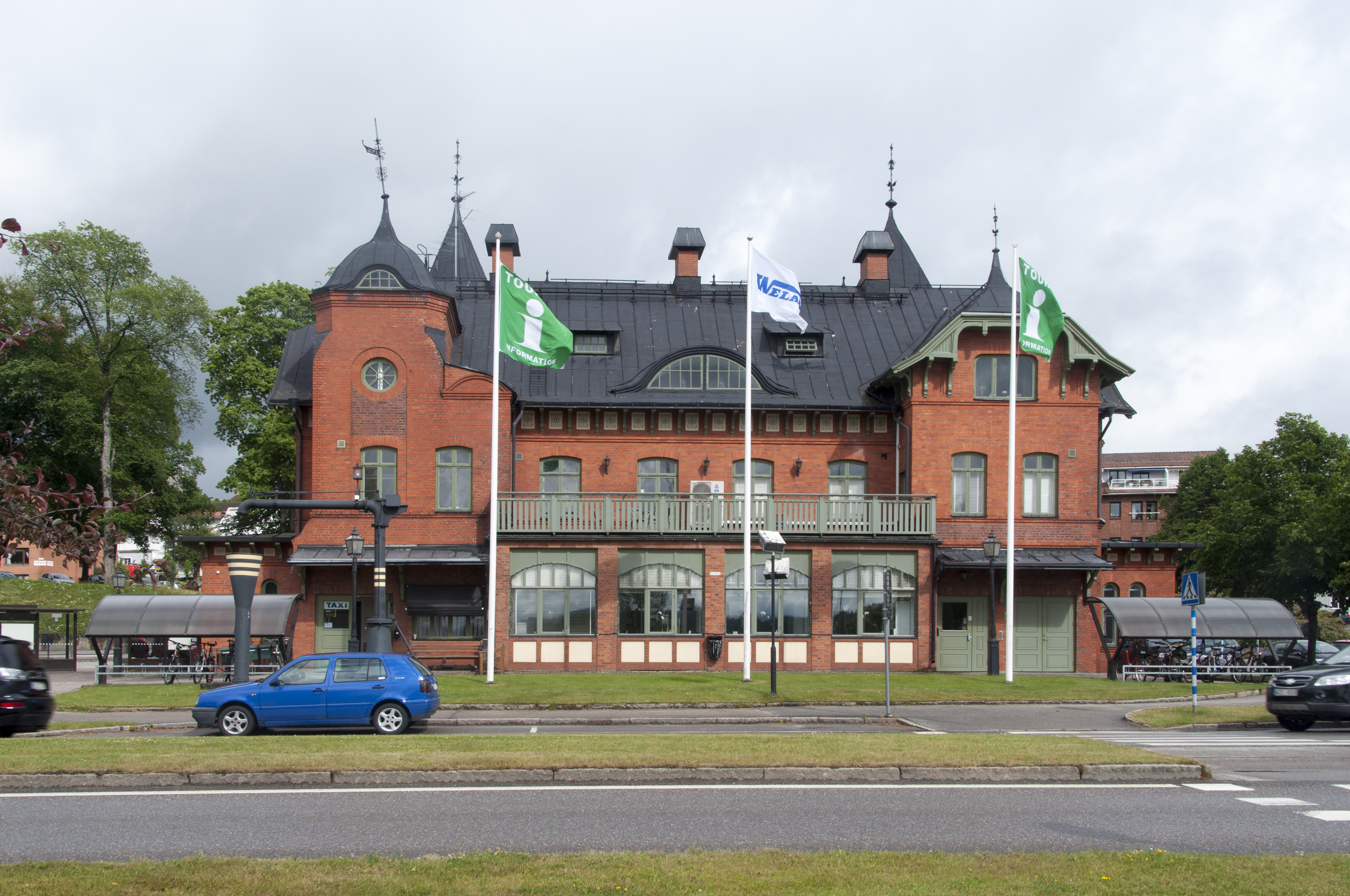 Ulricehamns stationshus, uppfört 1905. Arkitekt Axel Peterson